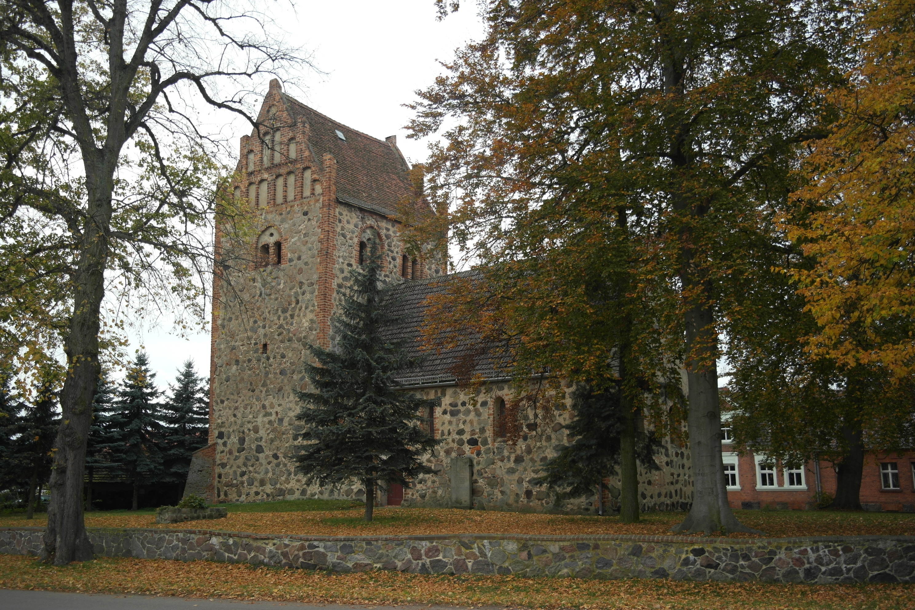 Dorfkirche Vehlow, denkmalgeschützt